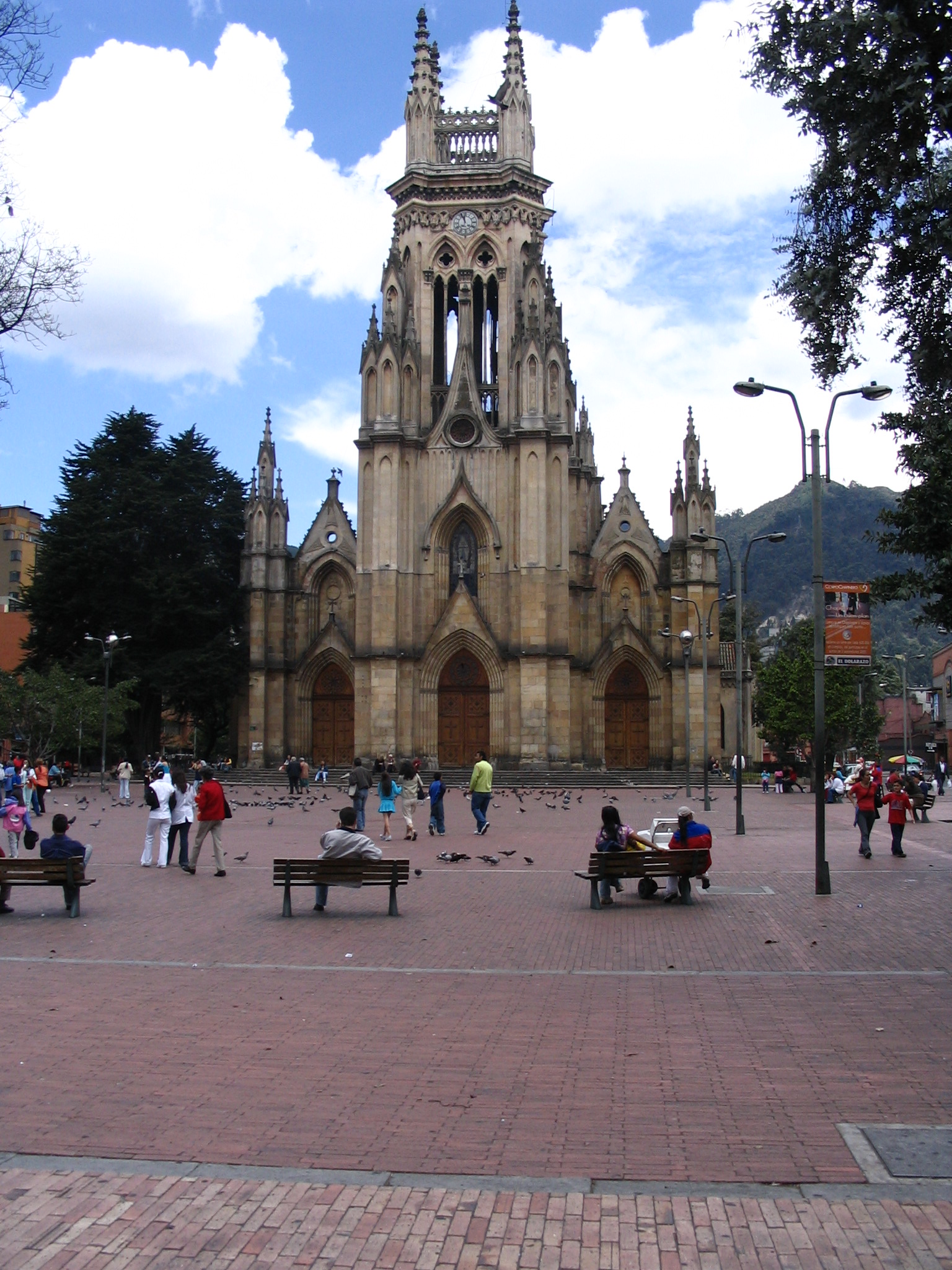 Iglesia de Lourdes, Barrio Chapinero, Bogotá. Fotografía tomada por Tequendamia para la wikipedia. Categoría:Colombia (imagen)